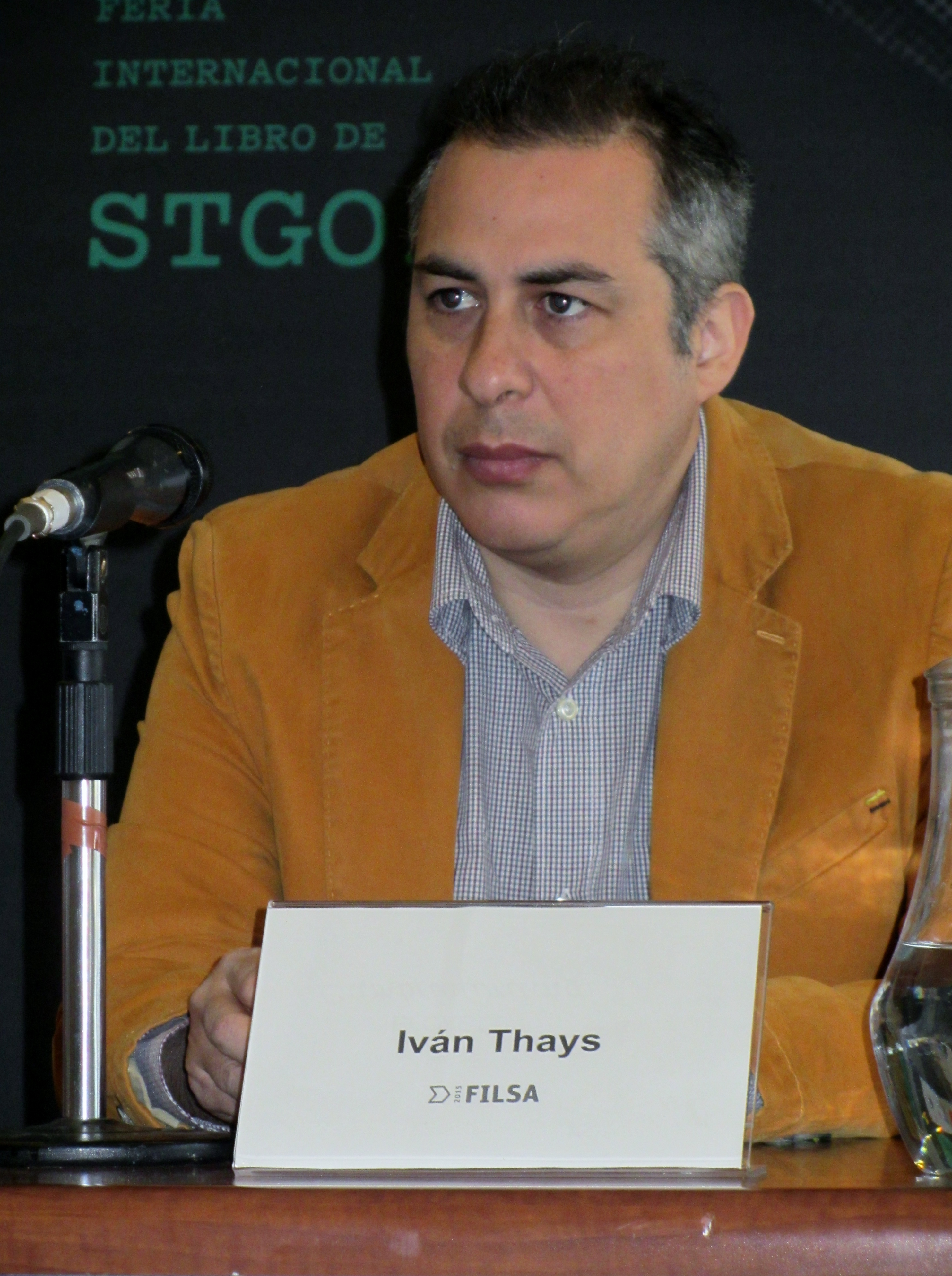 El escritor peruano Iván Thays en la Feria Internacional del Libro de Santiago 2015